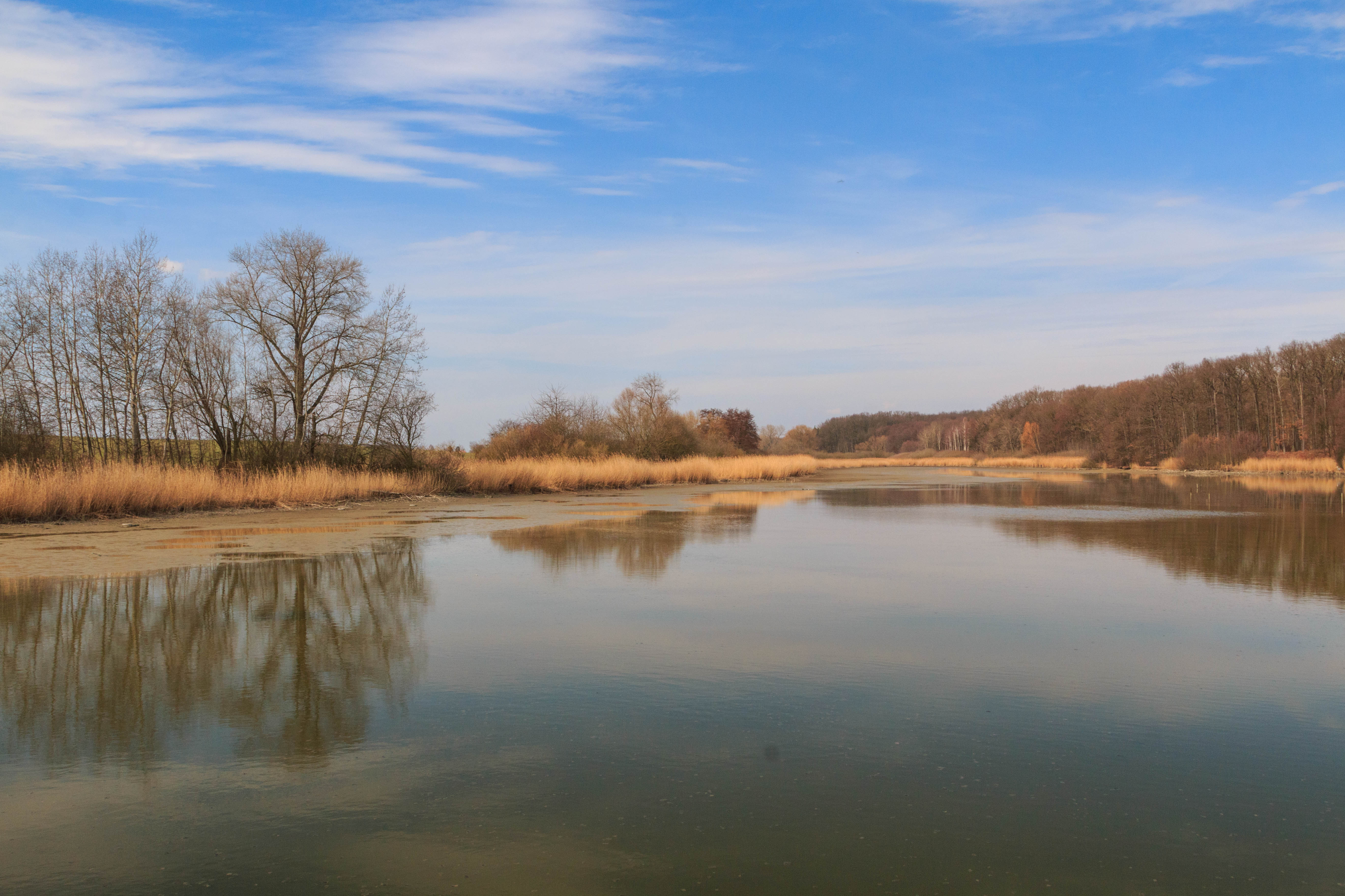 Olešnický rybník